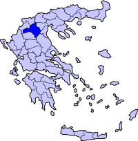 Greece, Kozani